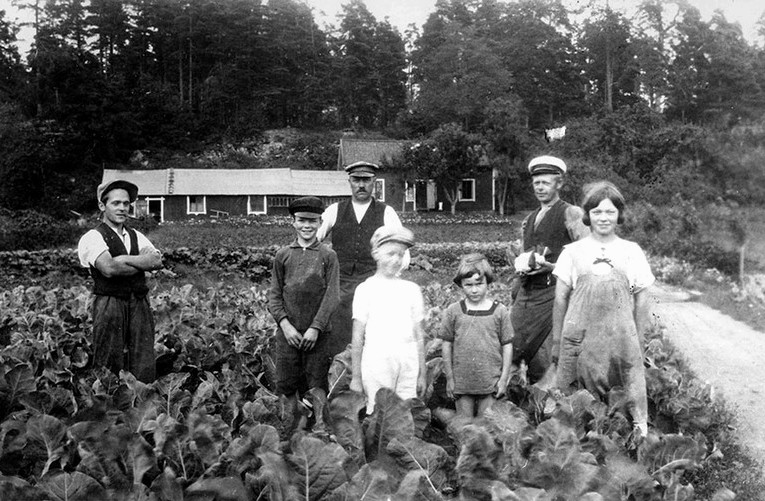 Sköndals handelsträdgård, idag Sköndals koloniområde